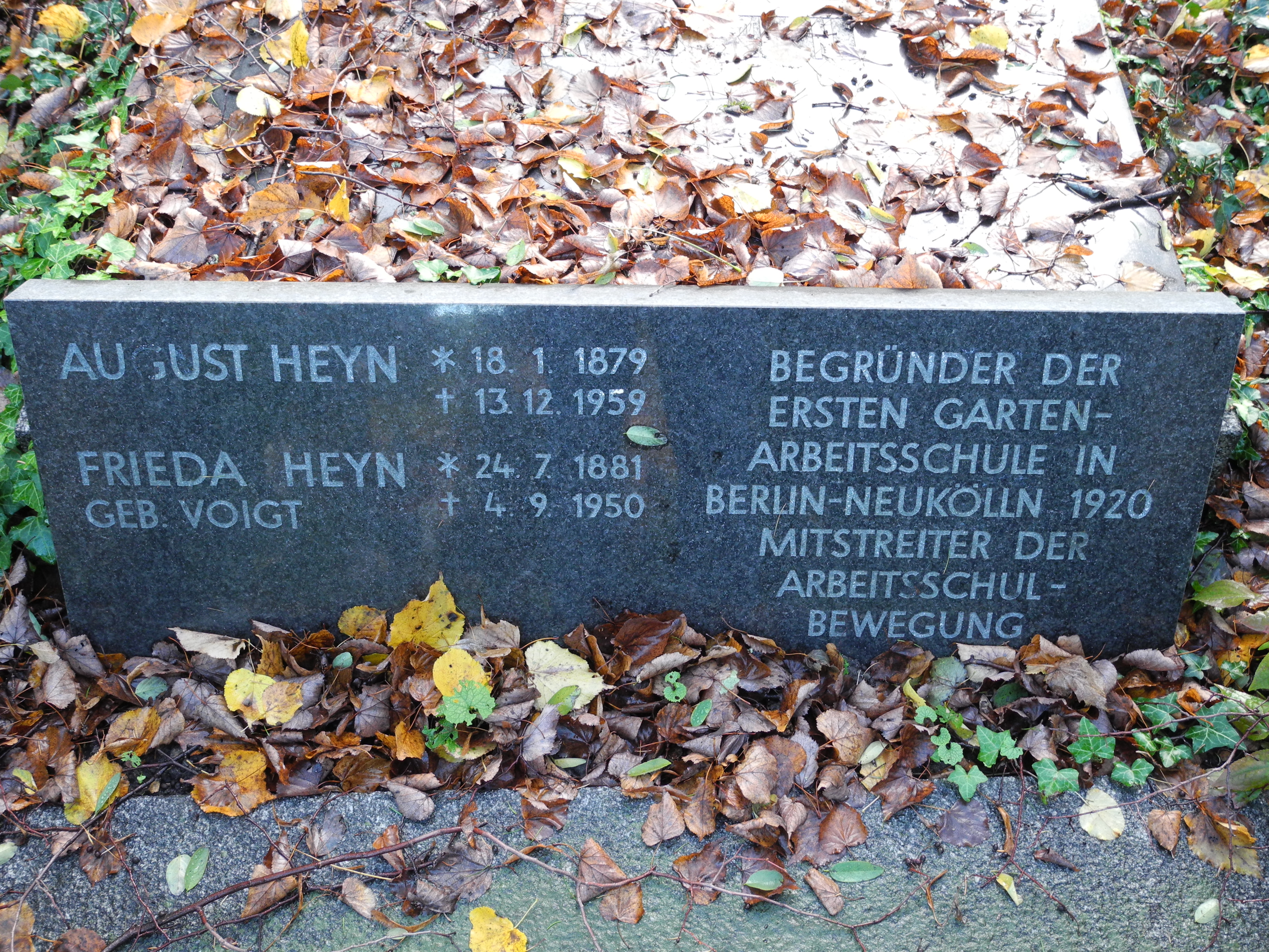 Grabstätte August Heyn (geb.: 18. Jan. 1879, gest.: 13. Dez. 1959), Reformpädagoge, Gründer der ersten Berliner Gartenarbeitsschule in Berlin-Neukölln 1920, Mitstreiter der Arbeitsschulbewegung, und seiner Ehefrau Frieda Heyn, geb. Vogt (geb.: 24. Juli 1881, gest. 4. Sept. 1950), in Berlin-Kreuzberg, Friedrichswerderscher Friedhof II, Bergmannstr.